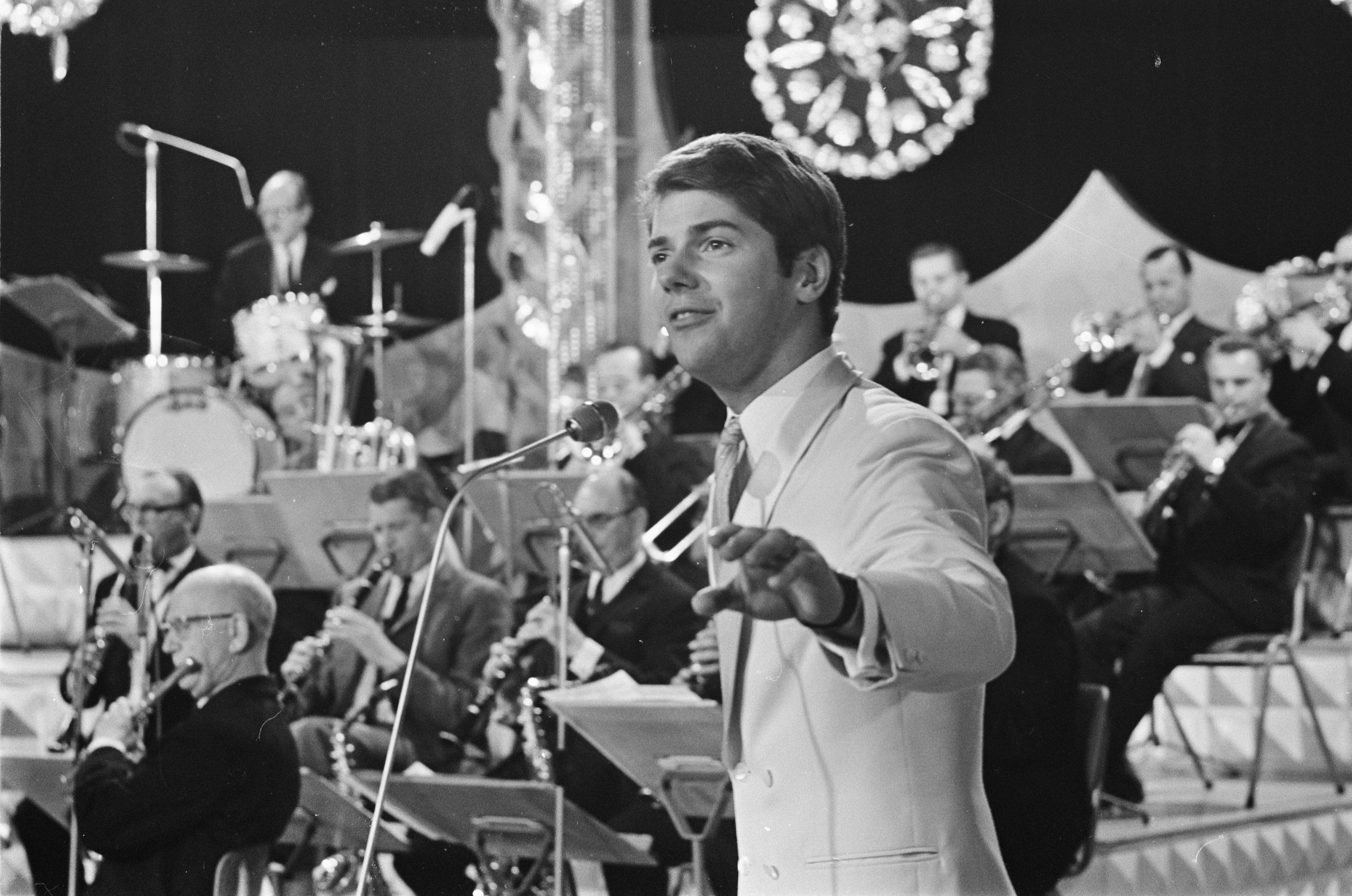 Collectie / Archief : Fotocollectie Anefo Reportage / Serie : [ onbekend ] Beschrijving : Finale Nederlands Songfestival in Tivoli te Utrecht. Ronnie Tober met liedje "Morgen" (winnaar) Datum : 28 februari 1968 Locatie : Utrecht Trefwoorden : SONGFESTIVALS, Winnaars, finales Persoonsnaam : Tober, Ronnie Instellingsnaam : Tivoli Fotograaf : Koch, Eric / Anefo Auteursrechthebbende : Nationaal Archief Materiaalsoort : Negatief (zwart/wit) Nummer archiefinventaris : bekijk toegang 2.24.01.05 Bestanddeelnummer : 921-1227